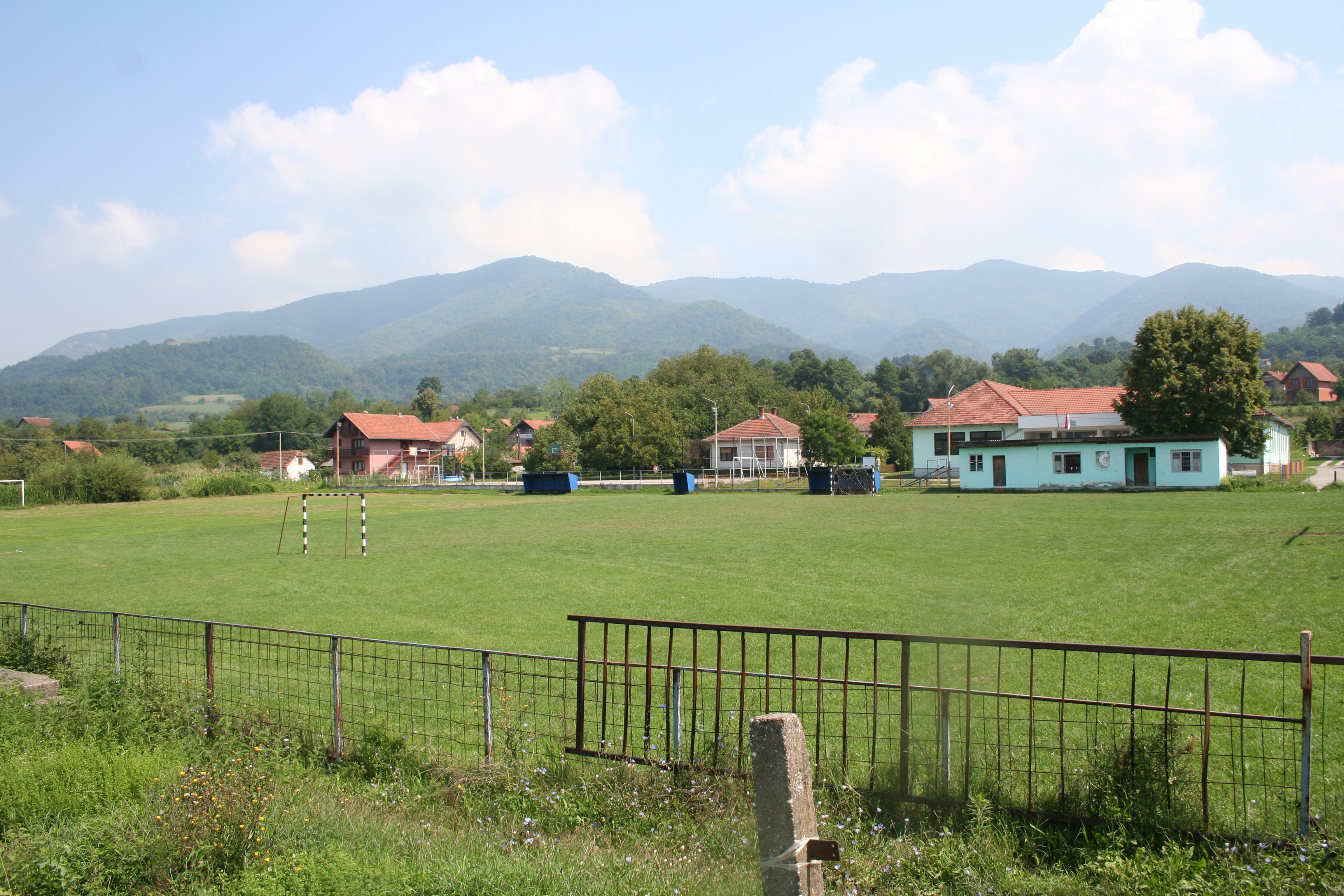 Fudbalsko igralište, Brasina